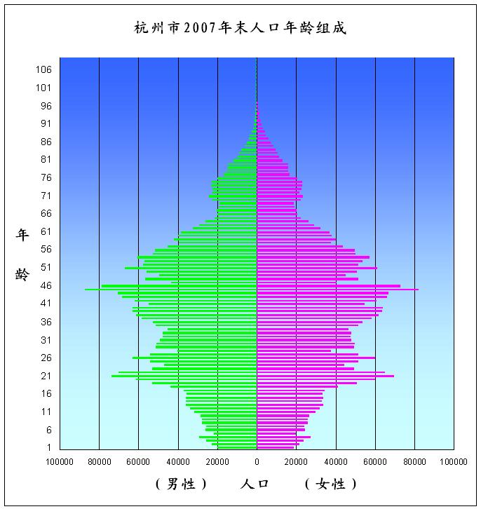 杭州市2007年末男女人口年龄组成图，数据来自2008年杭州市统计年鉴。